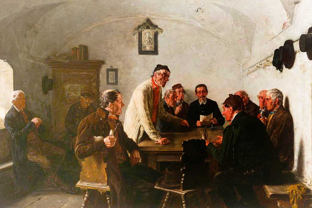 Gemeinderatsversammlung im Wirtshaus. Öl auf Leinwand. Signiert. 87,5 x 131 cm